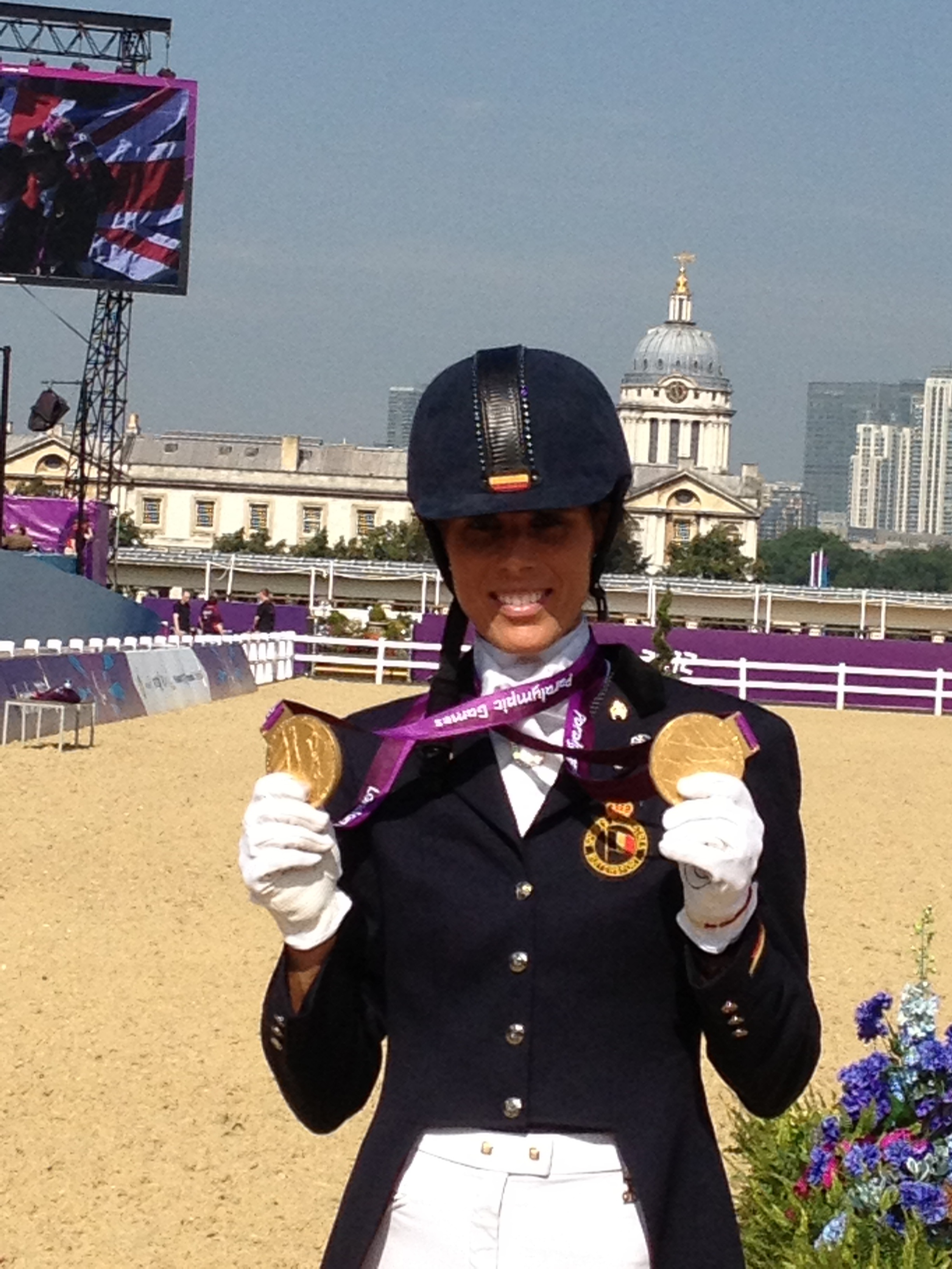 Michèle George na ontvangst van haar tweede gouden medaille.